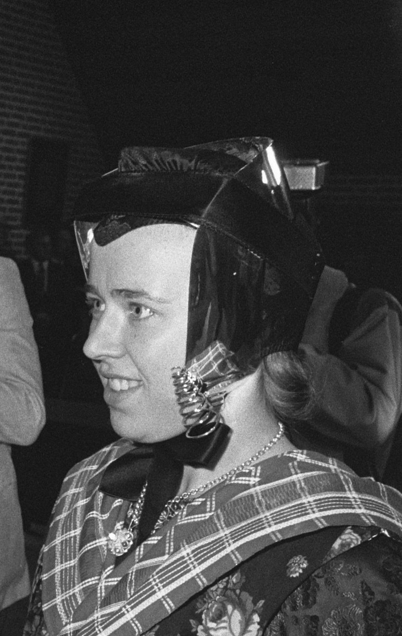 Collectie / Archief : Fotocollectie Anefo Reportage / Serie : [ onbekend ] Beschrijving : Prins Claus opent nieuwe gemeentehuis van Staphorst; Prins Claus onthult gemeentewapen van gemeentehuis Datum : 9 juni 1982 Locatie : Overijssel, Staphorst Trefwoorden : gemeentehuizen, onthullingen, openingen Persoonsnaam : Claus, prins Fotograaf : Antonisse, Marcel / Anefo Auteursrechthebbende : Nationaal Archief Materiaalsoort : Negatief (zwart/wit) Nummer archiefinventaris : bekijk toegang 2.24.01.05 Bestanddeelnummer : 932-2038